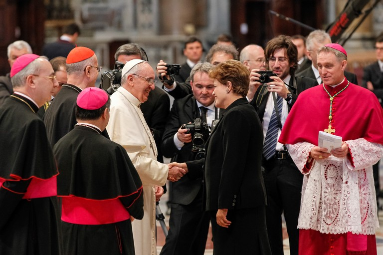 Presidenta Dilma Rousseff cumprimenta o papa Francisco após missa inaugural do pontificado na Praça São Pedro.